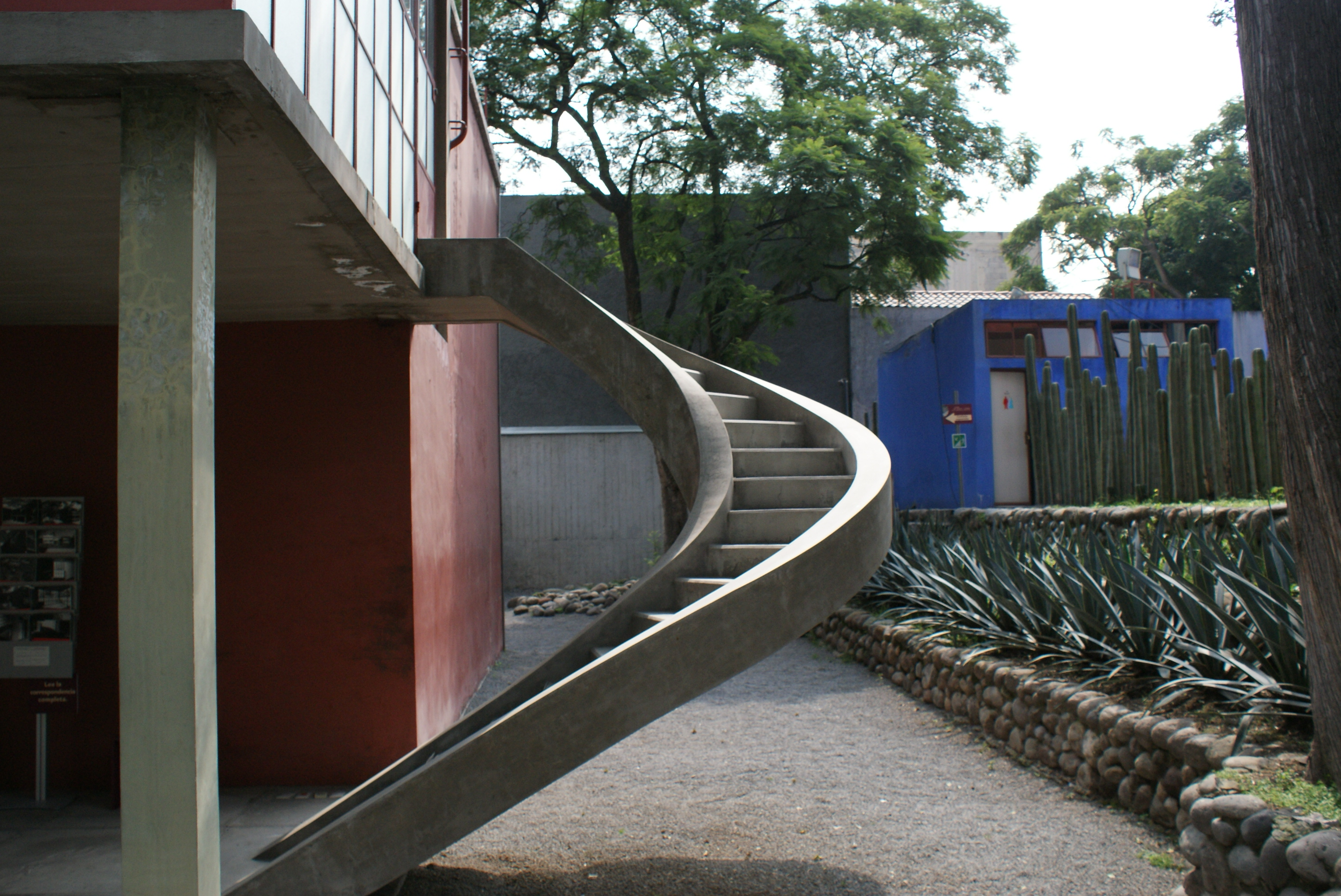 Entrada directa al segundo piso de la casa de Juan O'Gorman. Otra de las innovadoras escalinatas de complejo Museo Casa Estudio Diego Rivera y Frida Kahlo, en esta caso resalta su forma curva.